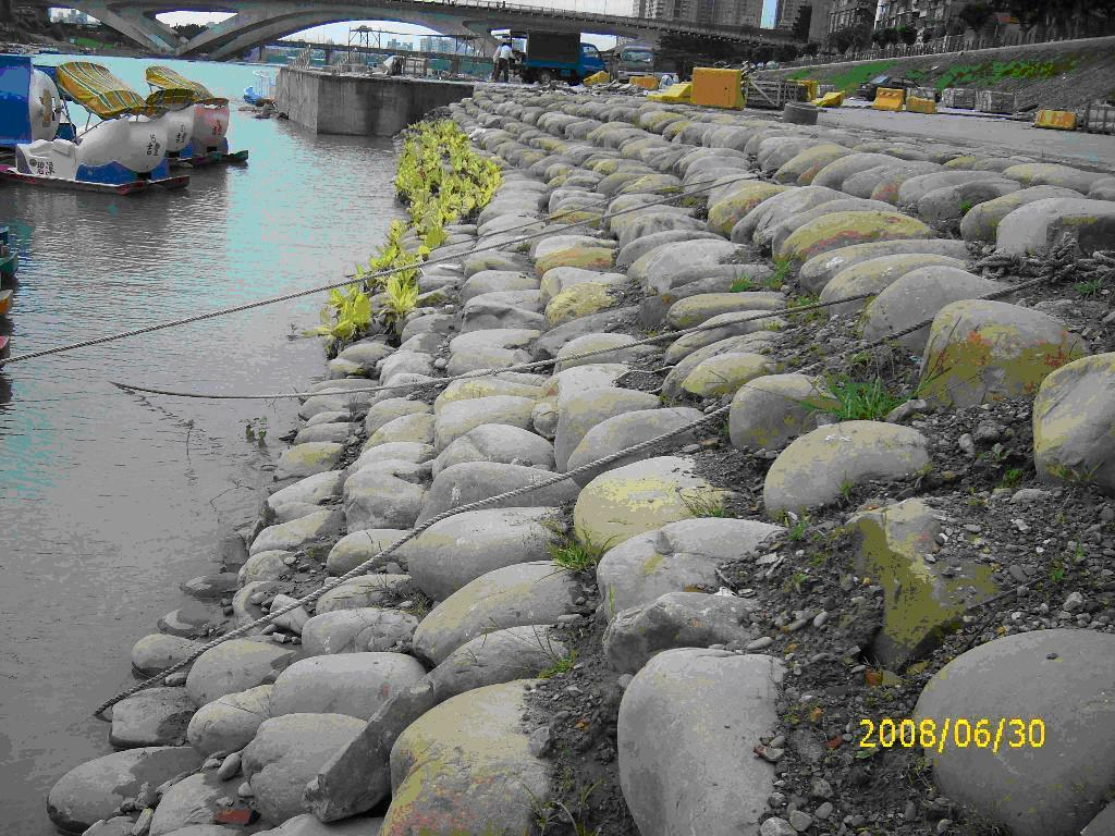 中文（台灣）: 碧潭再造